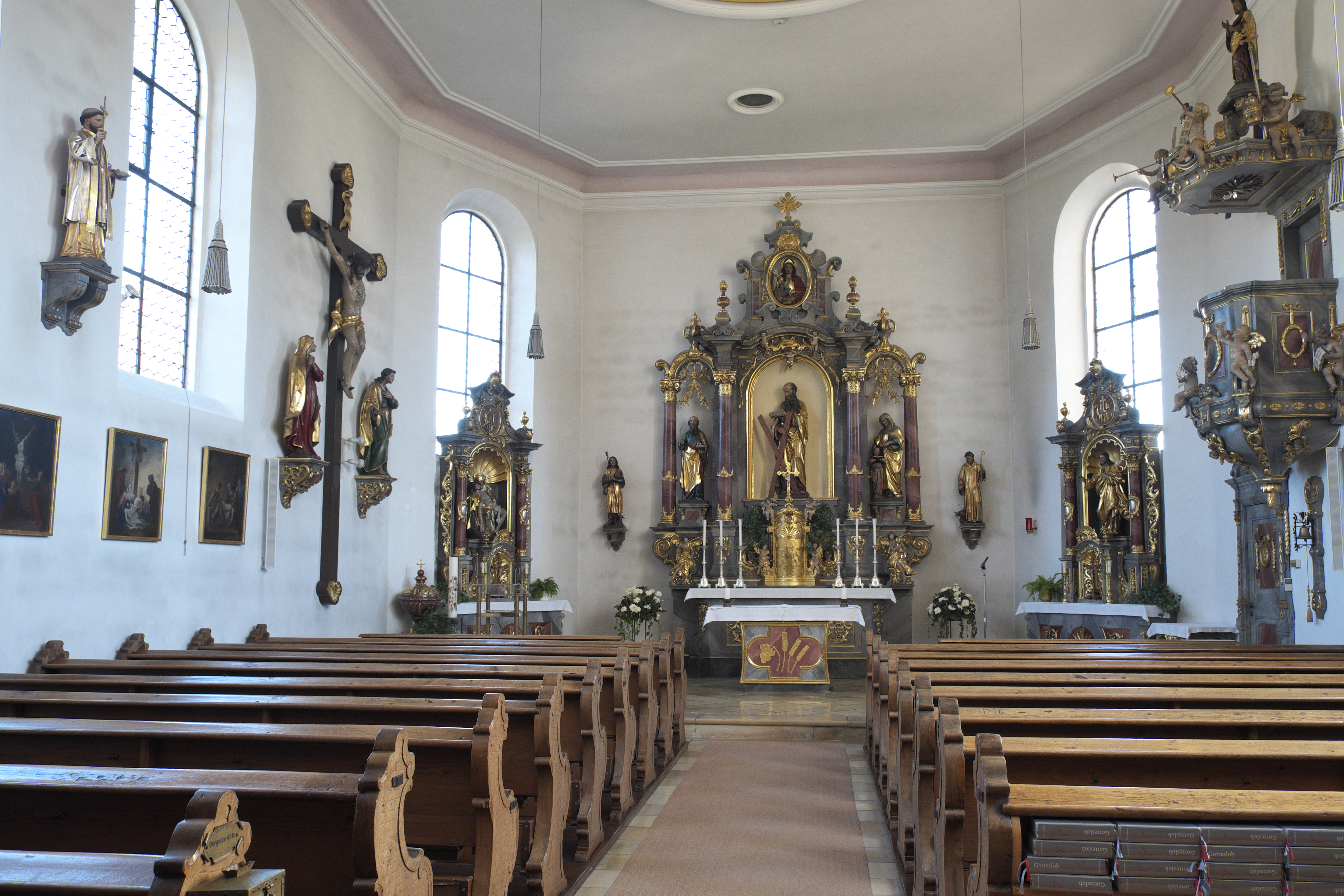 Katholische Kirche St. Andreas in Gremheim, einem Ortsteil von Schwenningen, Innenraum